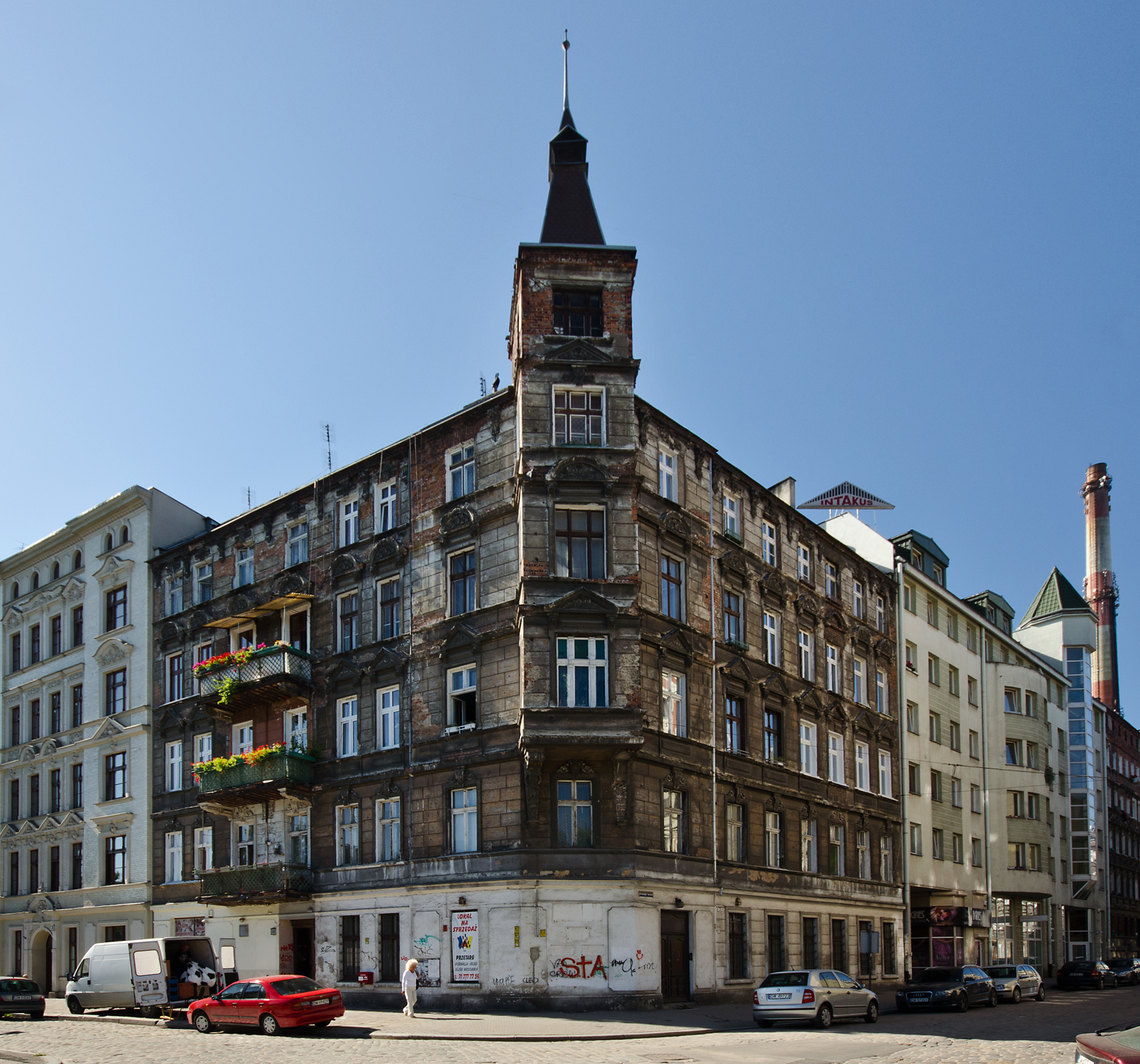 Kamienica pl. Staszica 10, Miasto Wrocław - Śródmieście